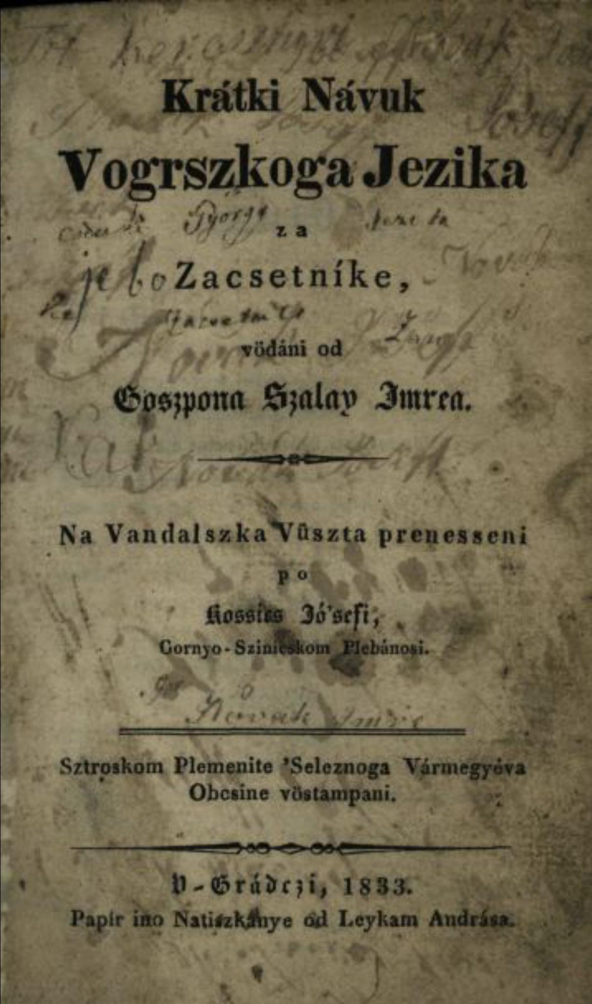 József Kossics: Kis Magyar Nyelvtan, grammar